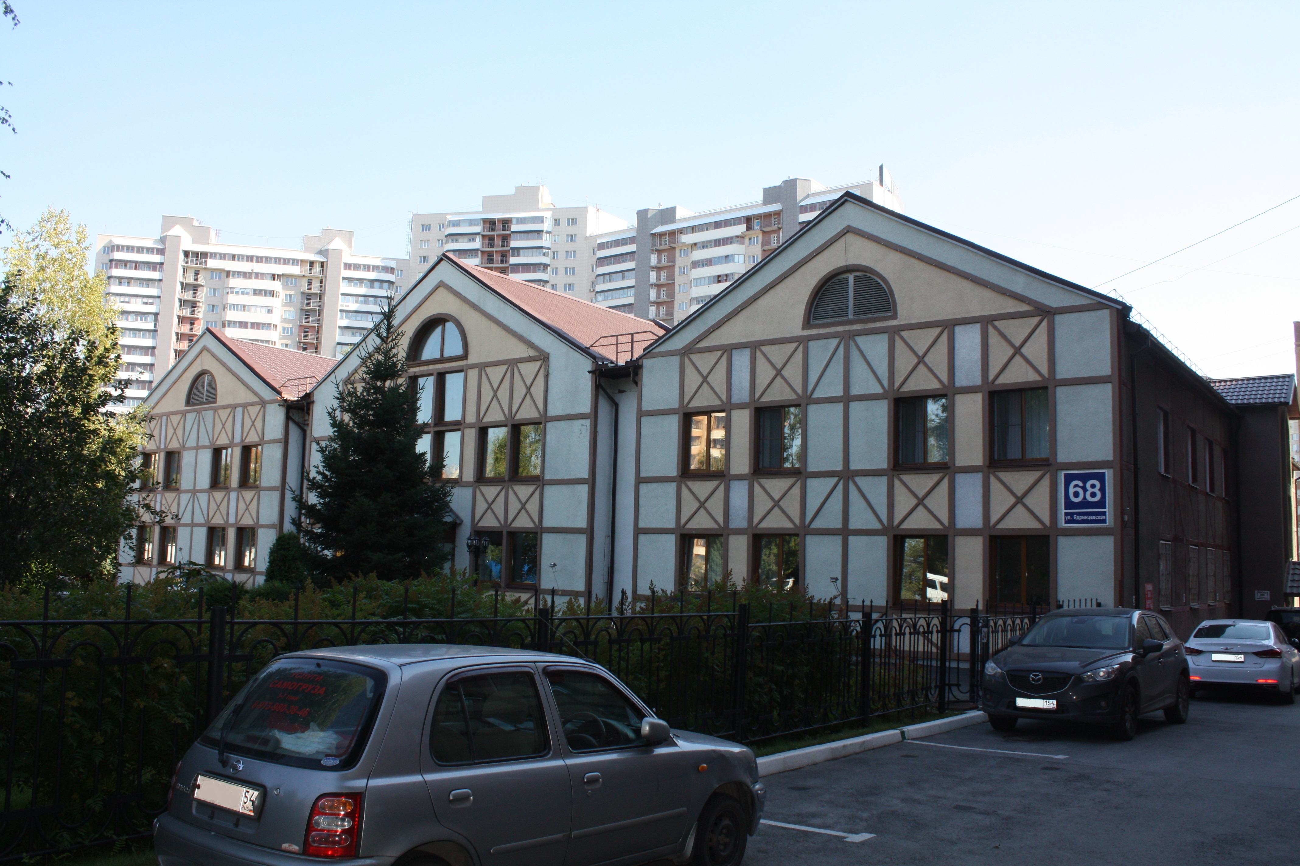 Rusisch-Deutsches Haus Von Gebiet Nowosibirsk.